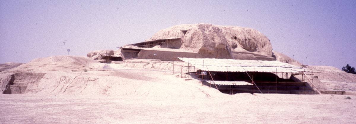 Teppe Sialk, from my old slides